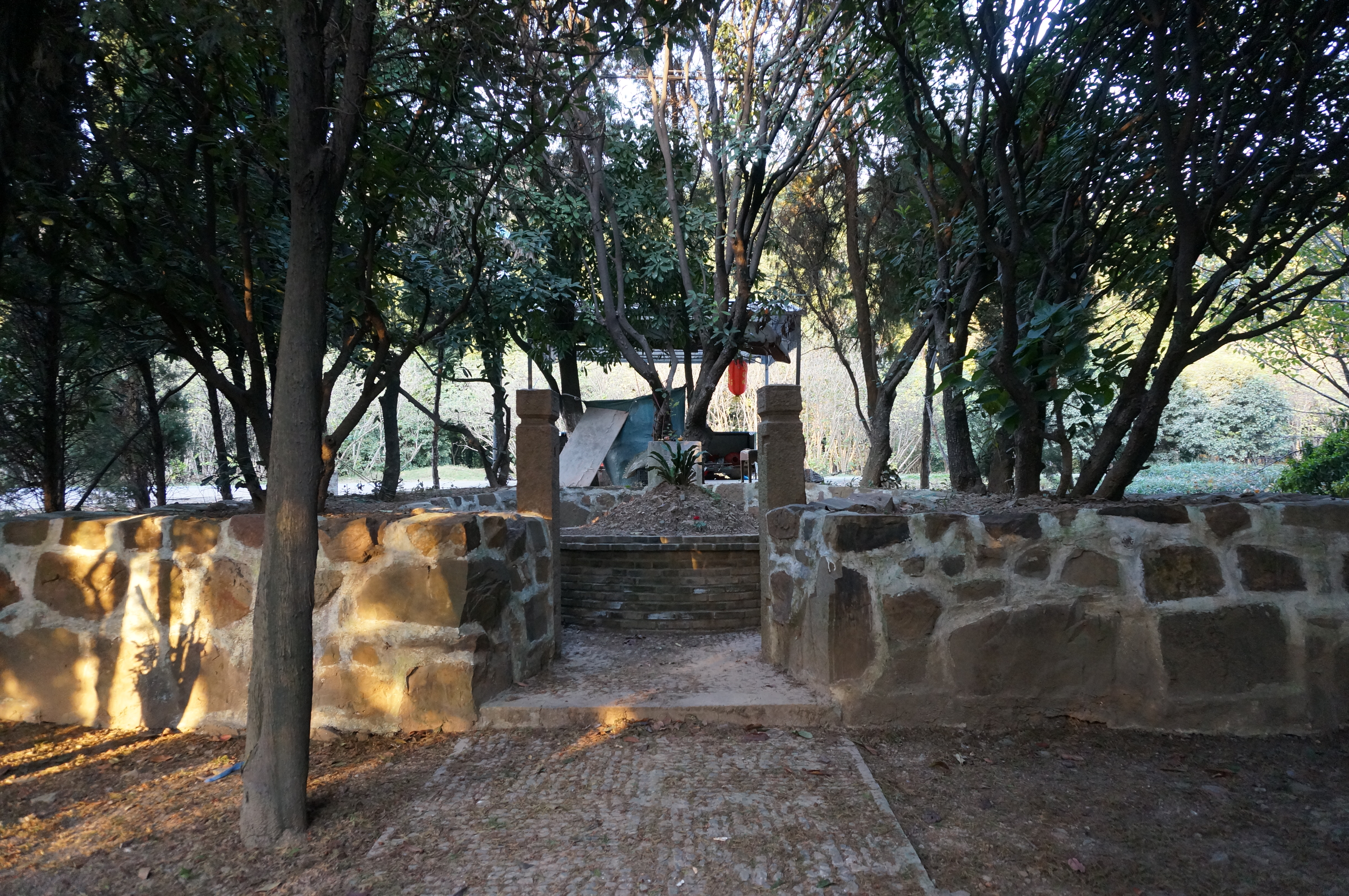 柳如是墓，罗城及墓堆。